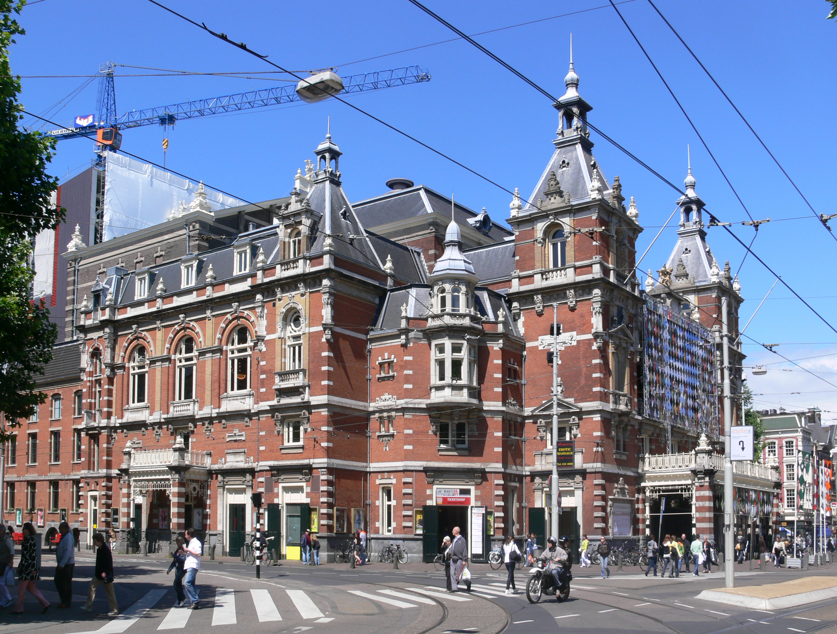 Stadsschouwburg, Leidesplein Amsterdam